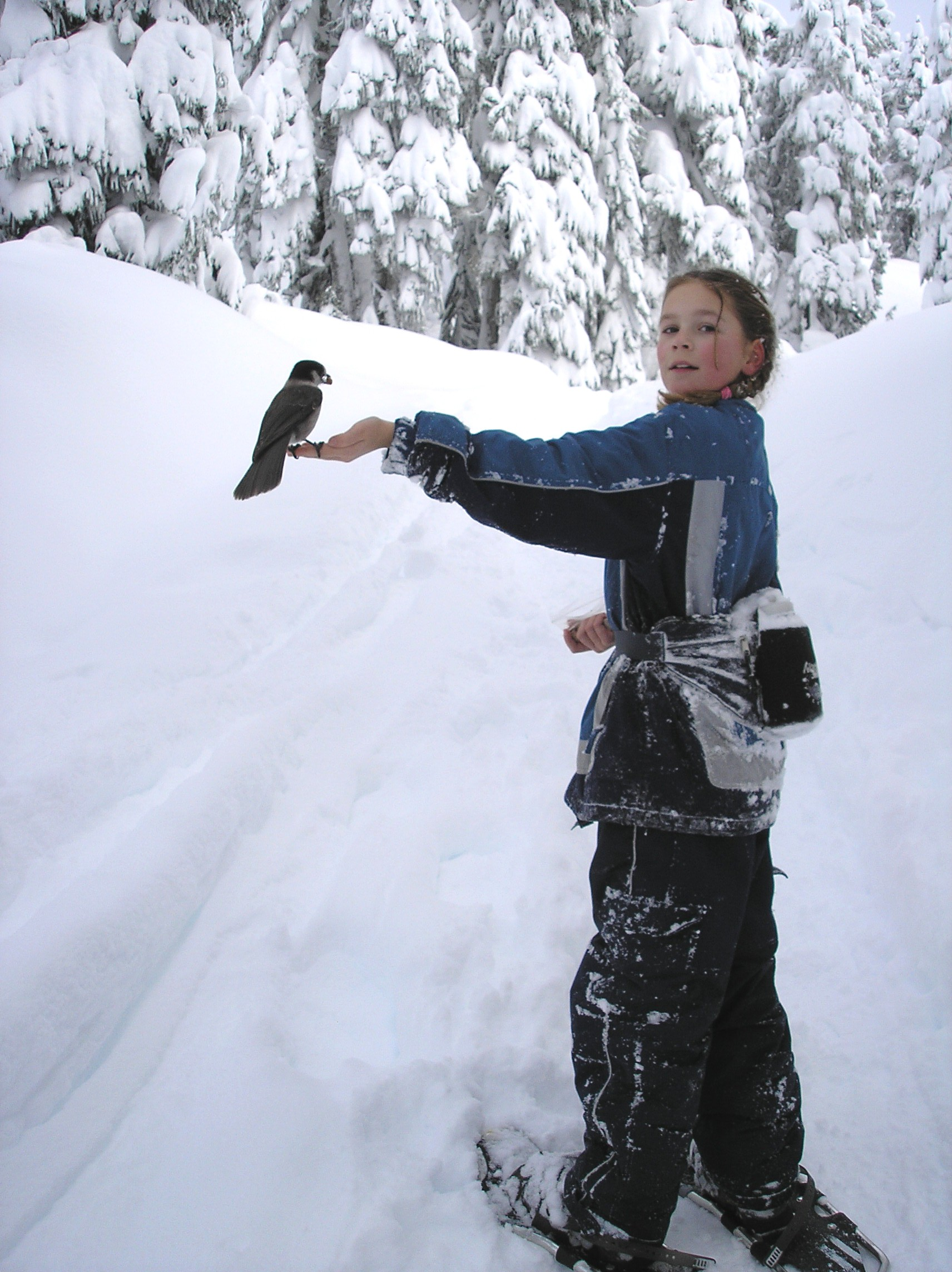 Grey Jay